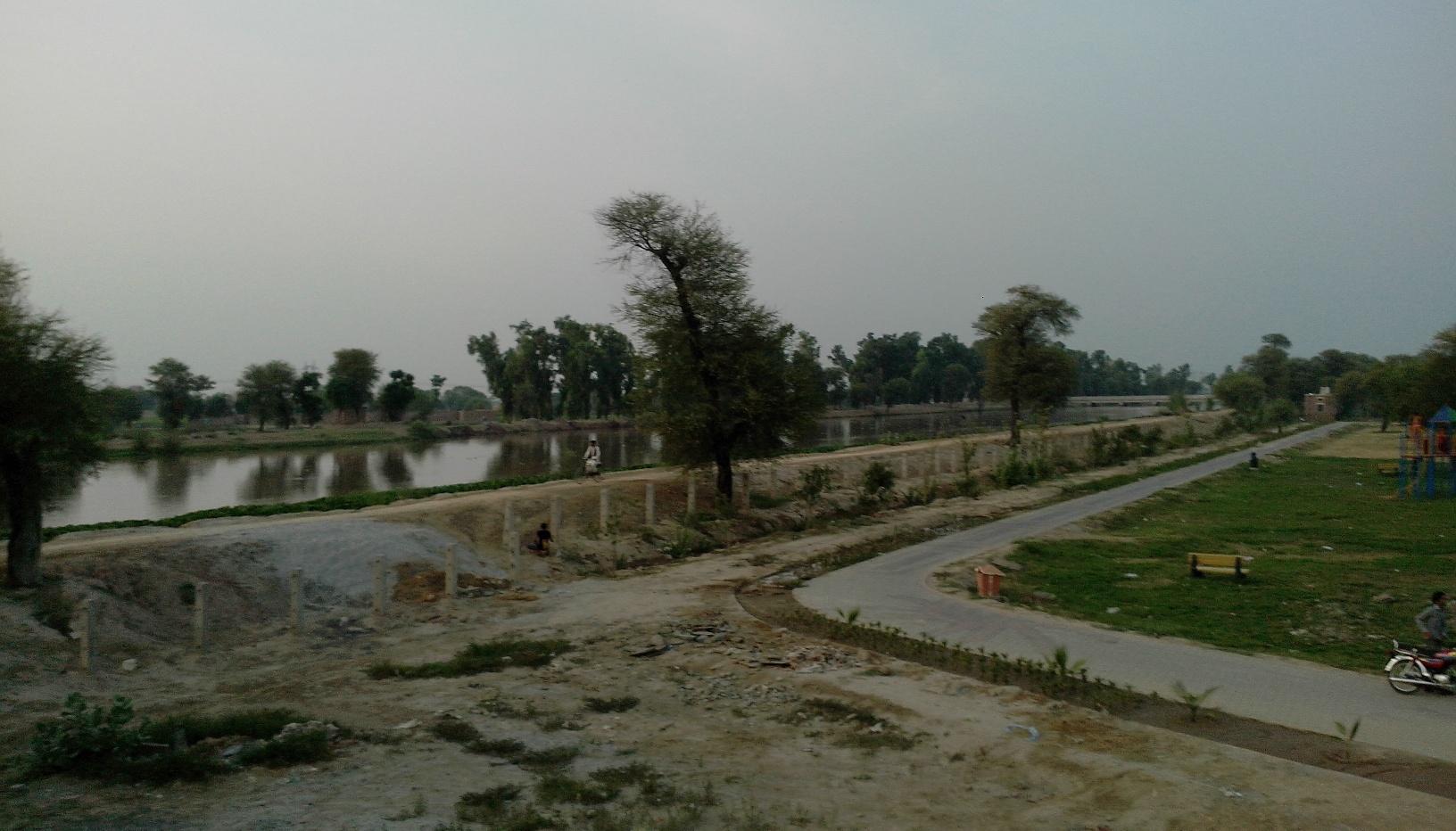 Okara Public Park, Okara